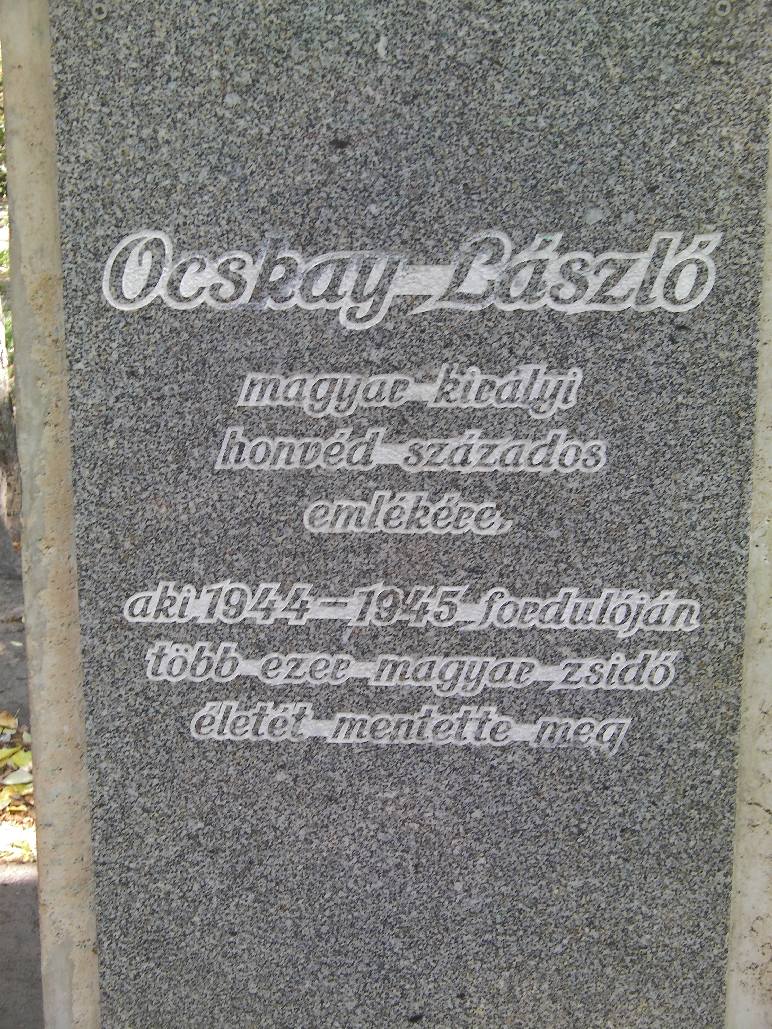 Mein-koun Ocskay László unan d'eus Ar re Just dre an nasionoù enoret e Budapest hag e Yad Vashem.